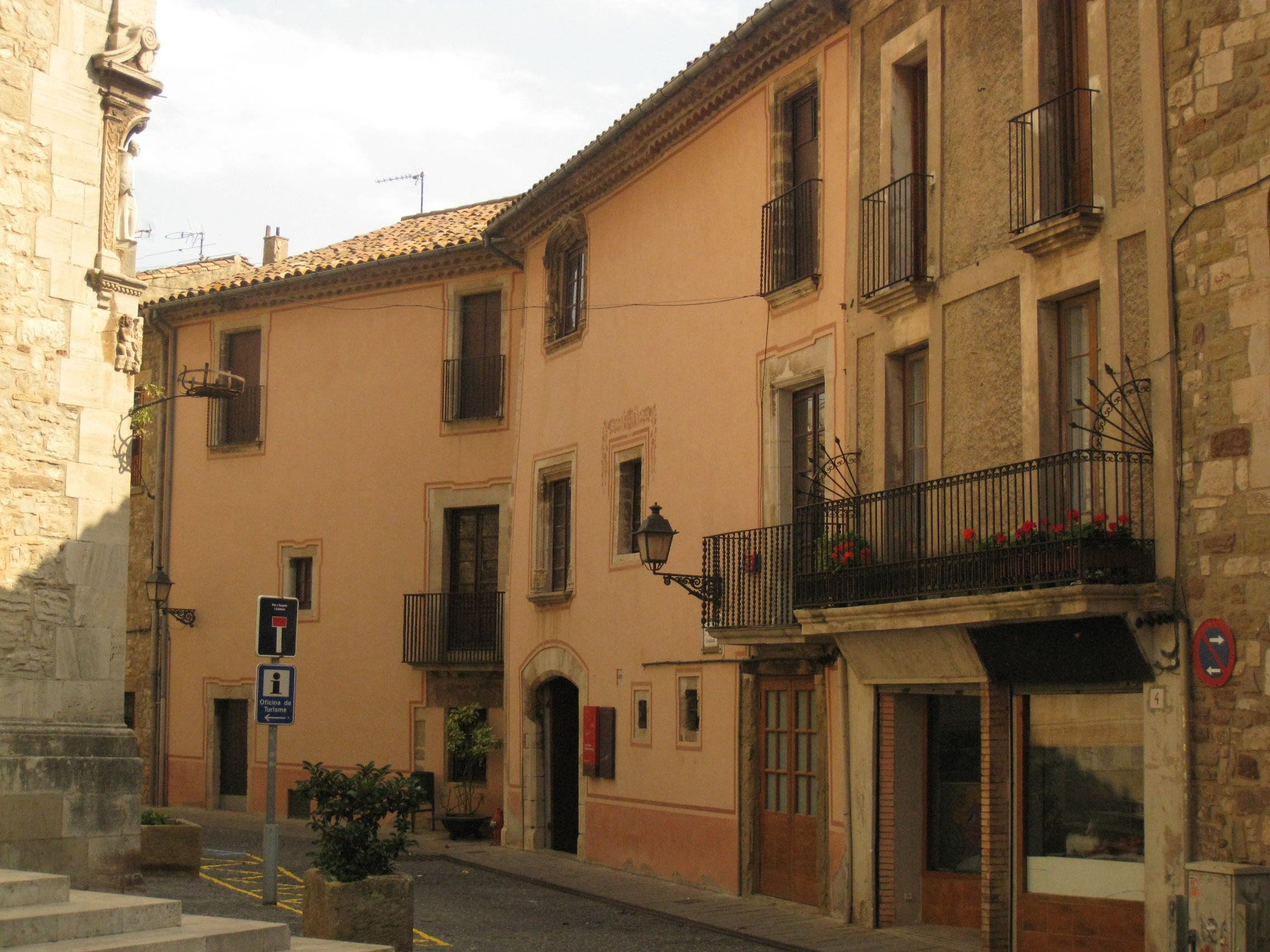 Casa museu Rafael Casanova, a Moià, del segle XVI, on va néixer el Conseller de la Ciutat de Barcelona, defensor de la ciutat durant el setge per part de les tropes borbòniques el 1714.